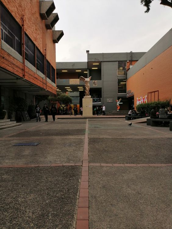 Explanada principal de la Facultad de Artes y Diseño de la UNAM, campus Xochimilco